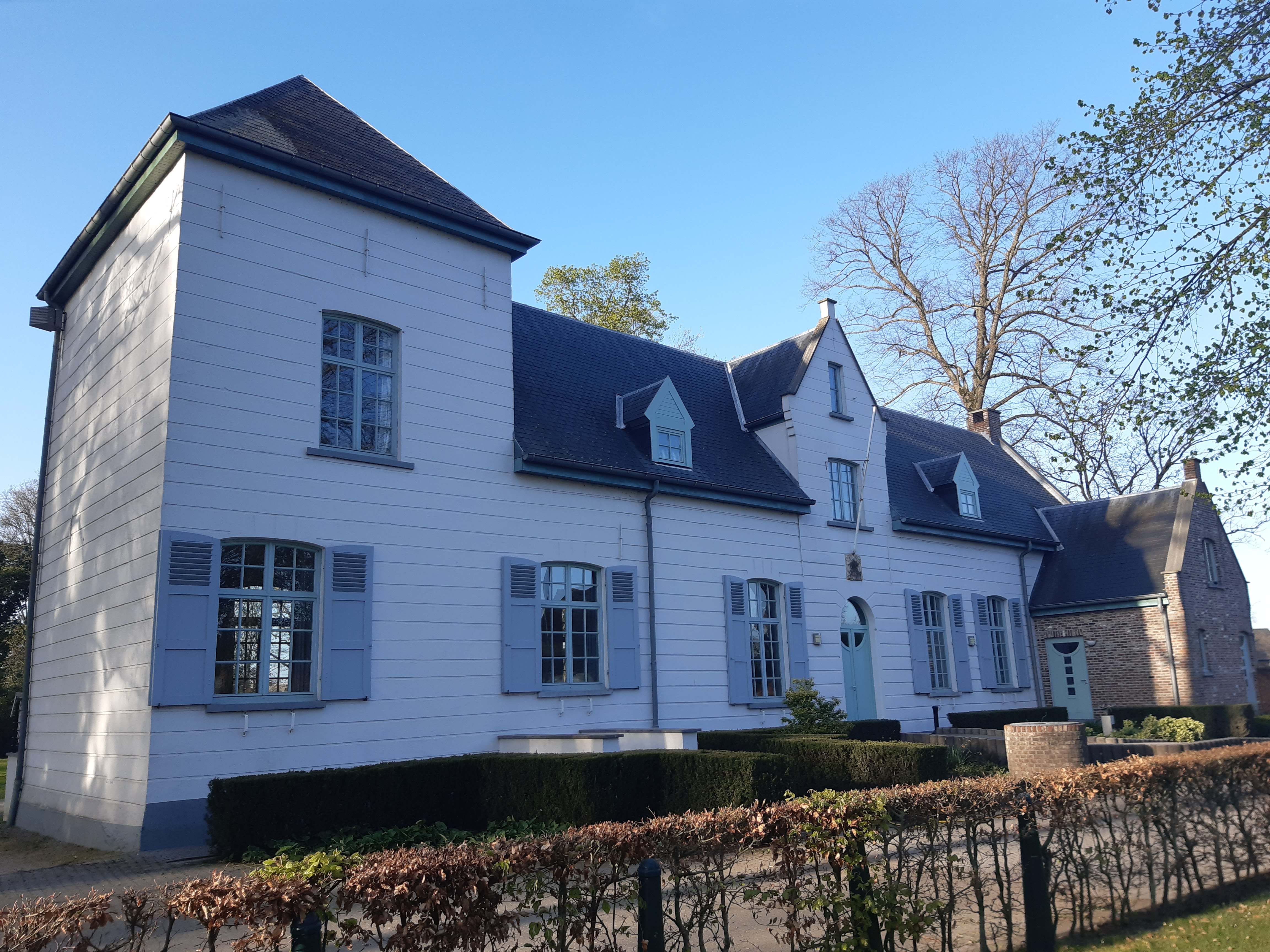 Foto genomen op 13/04/2020 voorgevel Oude pastorij